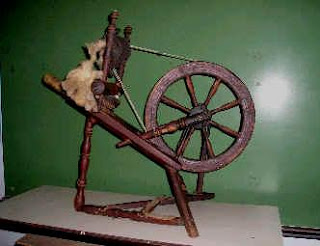 Rueca, maquina de hilar, torno de hilar o hiladora. Herramienta para unir fibras, incorpora rueda, pedal y manivela